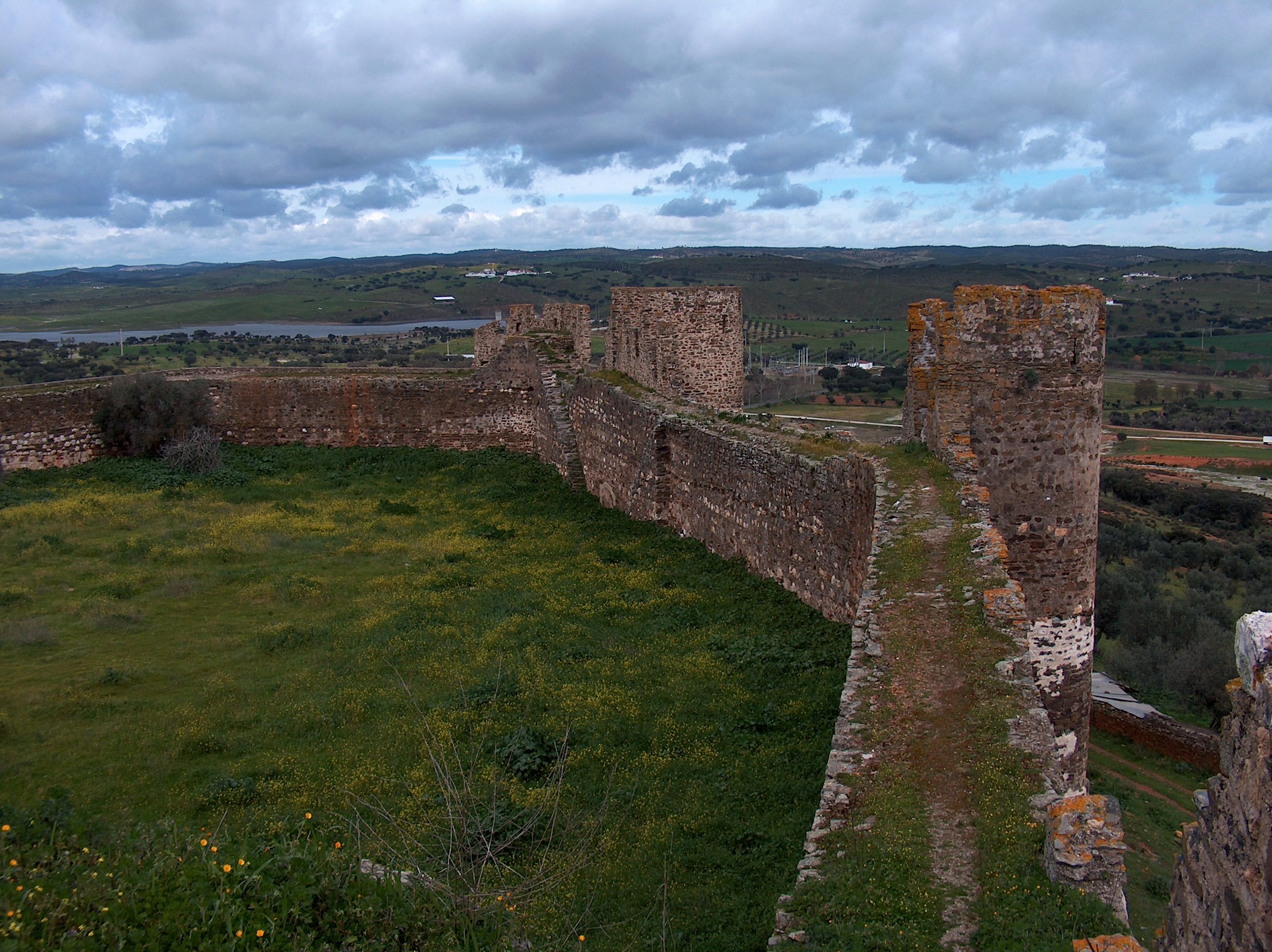 Castelo de Terena